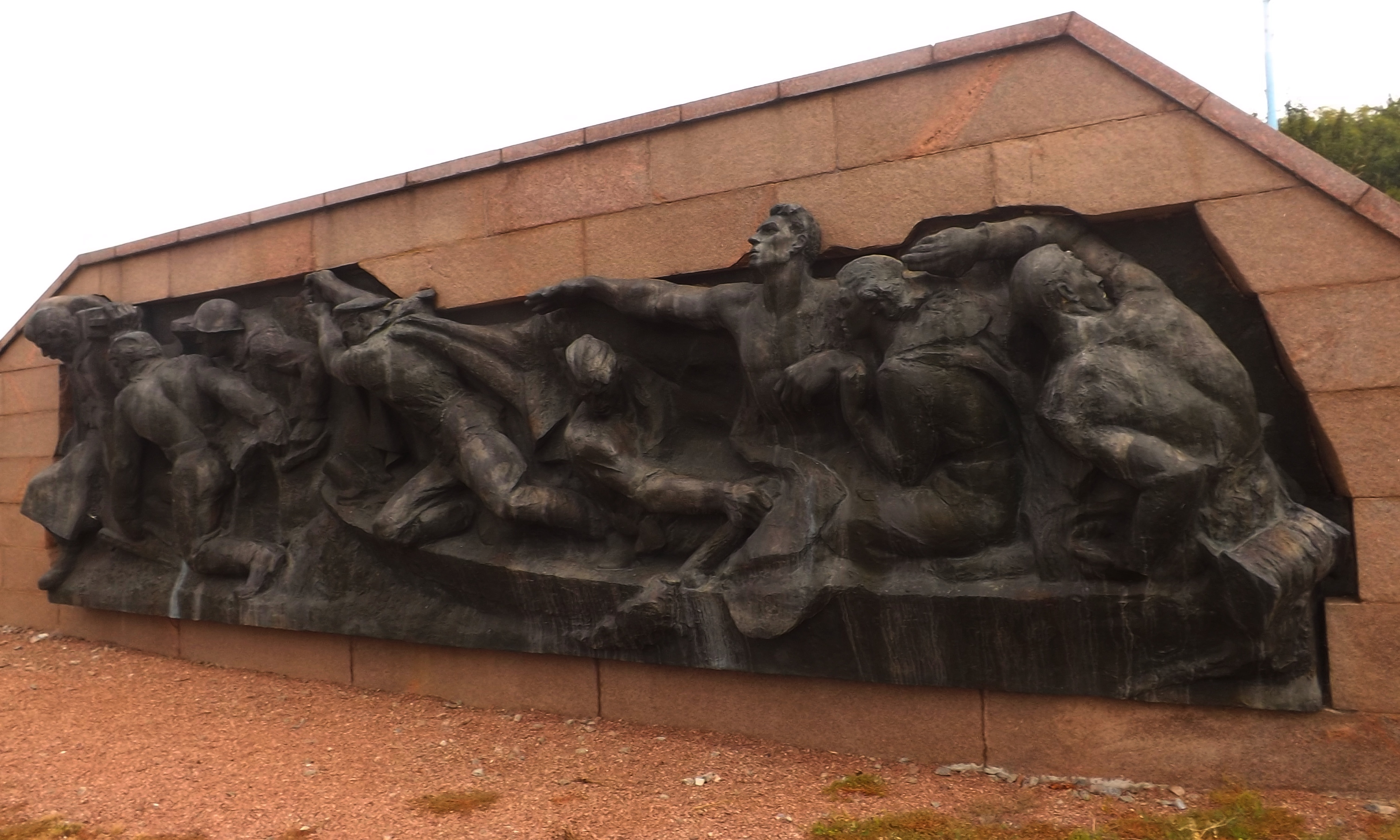 Ансамбль меморіального комплексу в с.Балико-Щучинка. фото 3